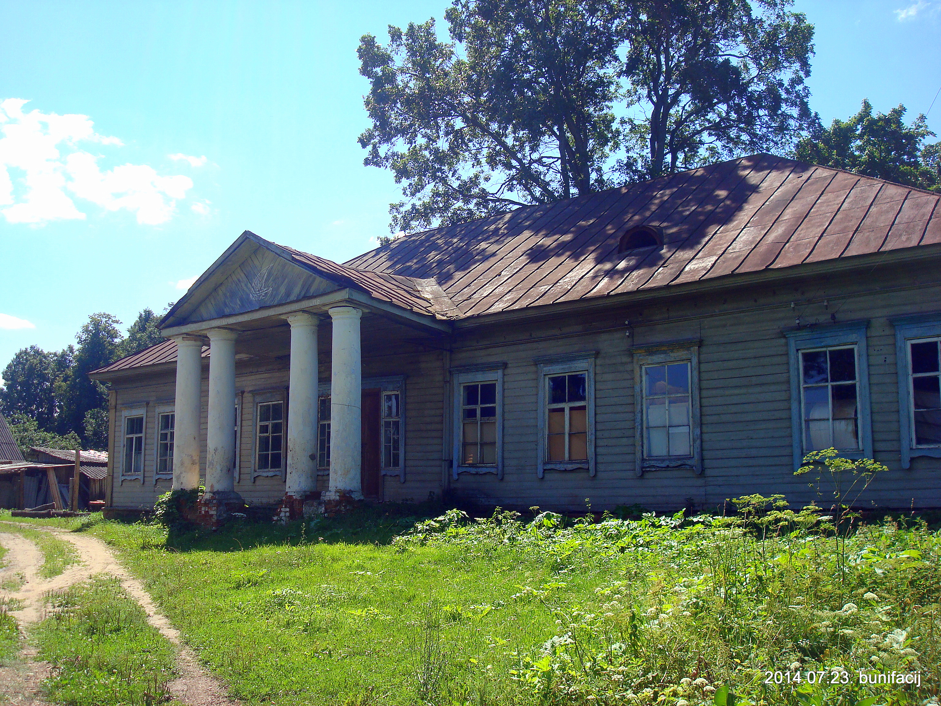 Усадебный дом Орлицких